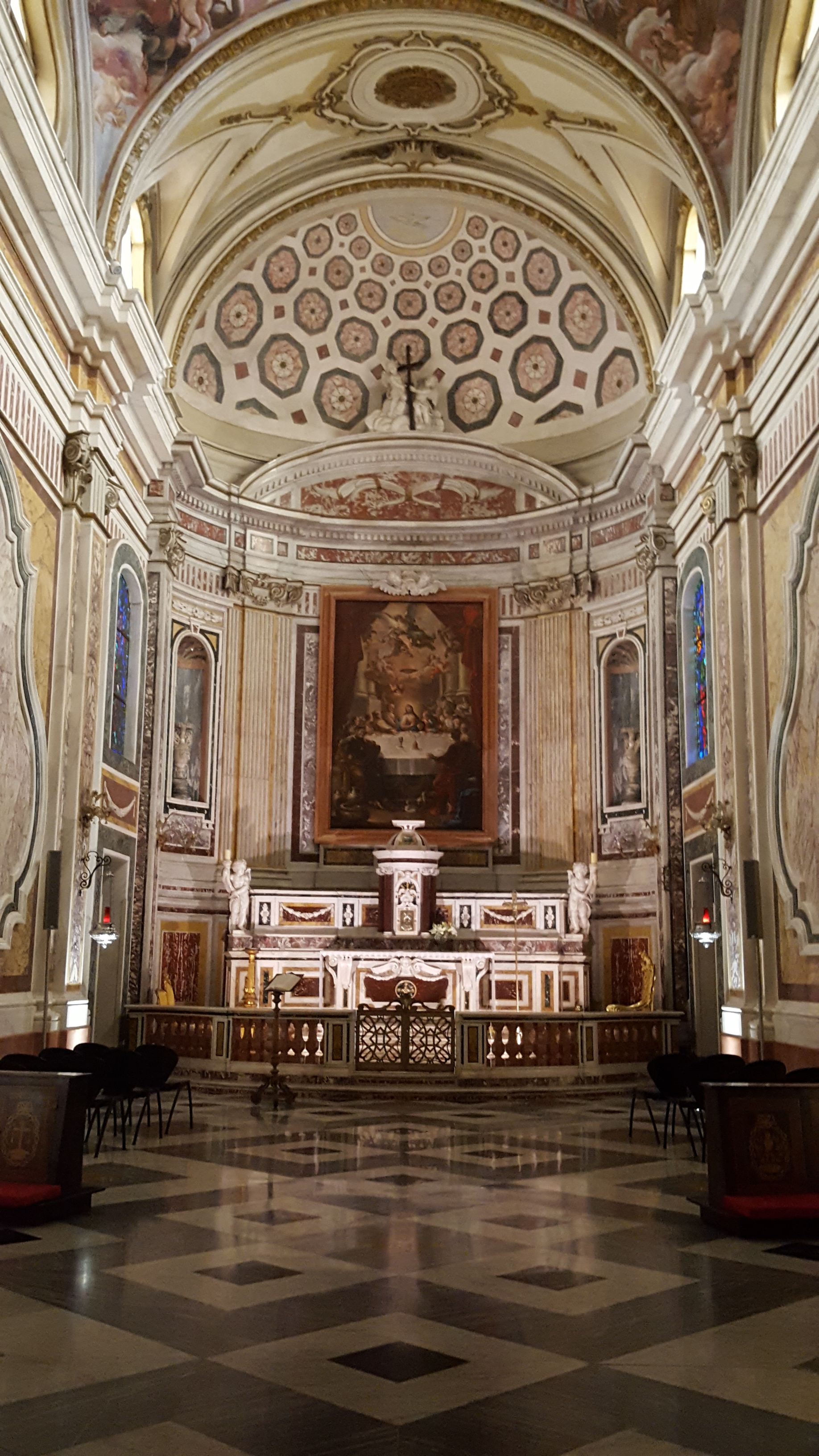 Cappella Santissimo Sacramento - Basilica San Martino, Martina Franca